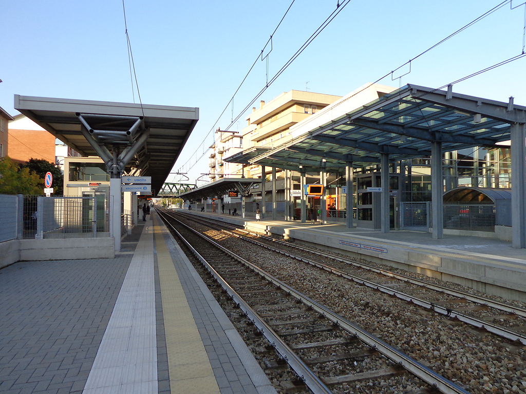 Stazione ferroviaria di Cesano Maderno, vista dei binari in direzione nord